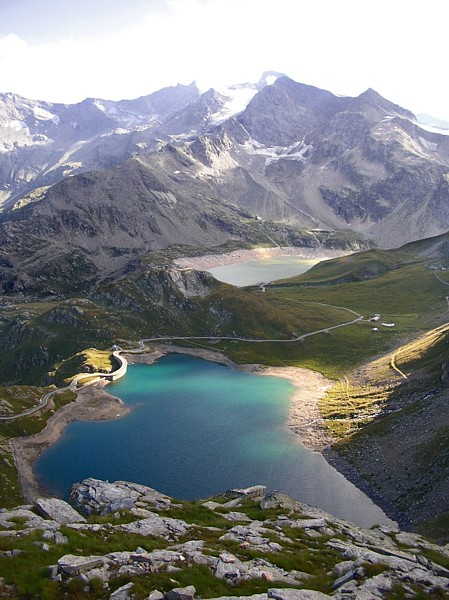 Nivolet, augustus 2005